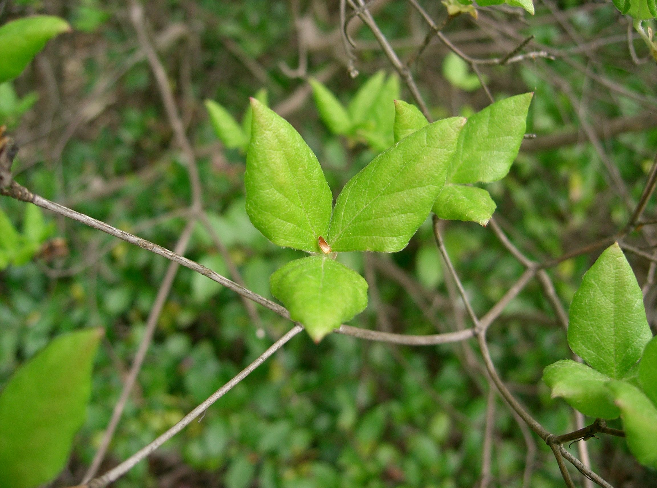 Scientific name: Rhododendron reticulatum